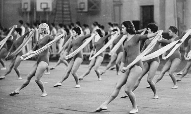 Leipzig, IV. Deutschen Turn- und Sportfest, Teilnehmer Zentralbild Wendorf-Schaar 5.11.1961 "Der Zukunft zugewandt" Zu einem ersten großen Höhepunkt in der Vorbereitung des vom 29. Juli bis 4. August 1963 in der Messestadt stattfindenden IV. Deutschen Turn- und Sportfestes gestaltete sich am Sonntagvormittag in der Ernst-Grube-Halle in der Deutschen Hochschule für Körperkultur in Leipzig die Miniaturschau. Vor namhaften Gästen, unter ihnen das Mitglied des Poiltbüros des ZK der SED und Vorsitzender des Bundesvorstandes des FDGB, Herbert Warnke, der Minister für Staatssicherheit, Erich Mielke, der Minister für Kultur, Hans Bentzien, der Präsident des Deutschen Turn- und Sportbundes, Manfred Ewald, der Vorsitzende des Staatlichen Komitees für Körperkultur und Sport, Alfred Neumann, sowie der Leipziger Oberbürgermeister Walter Kresse, zeigten 800 Sportlerinnen und Sportler der einzelnen Übungsverbände die Festübungen und die Sportschau für das zu erwartende Fest. UBz: Die Turnerinnen des DTSB während ihrer Übung.